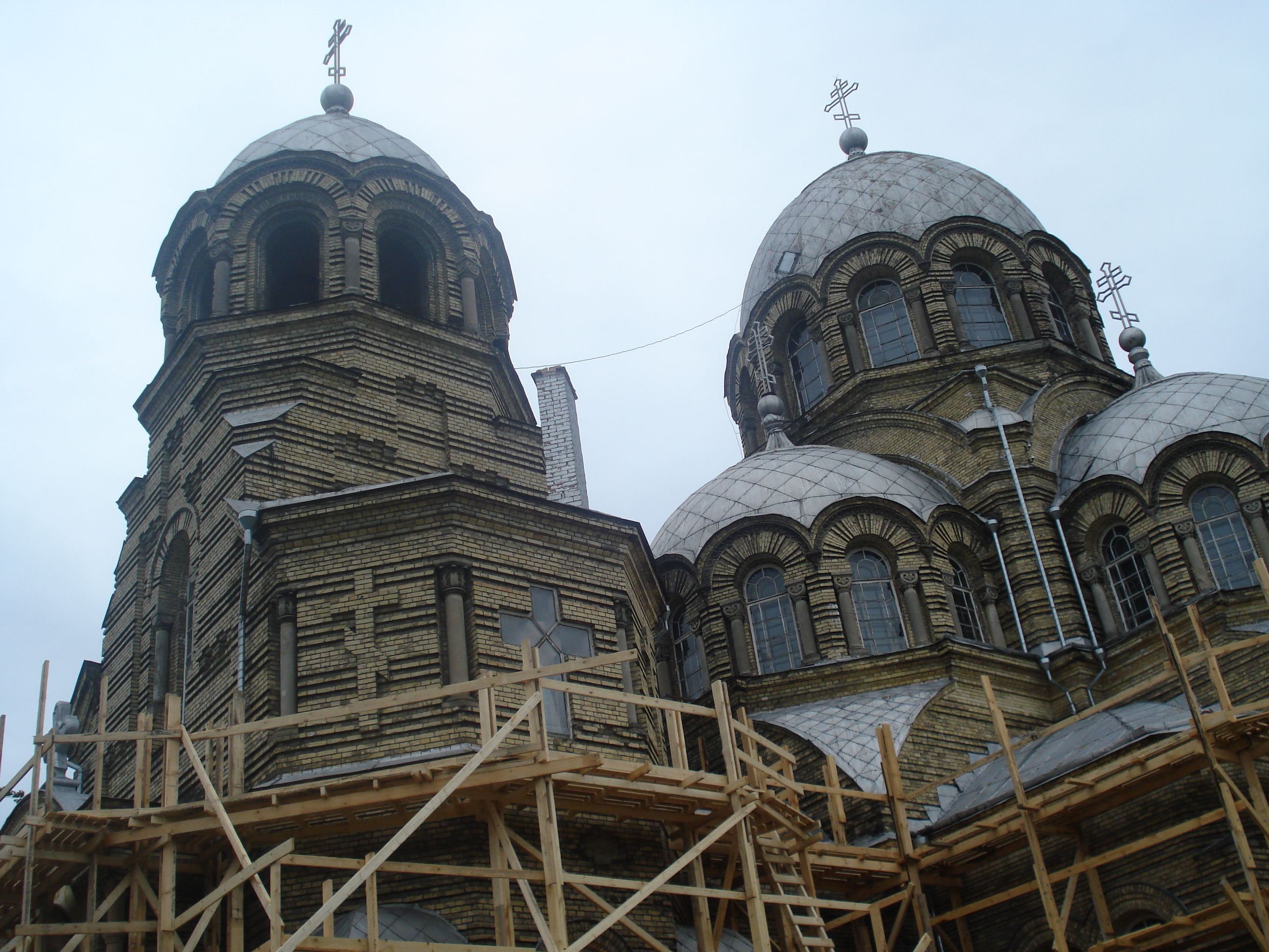 Znamenskaya church in Vilnius Žveryne